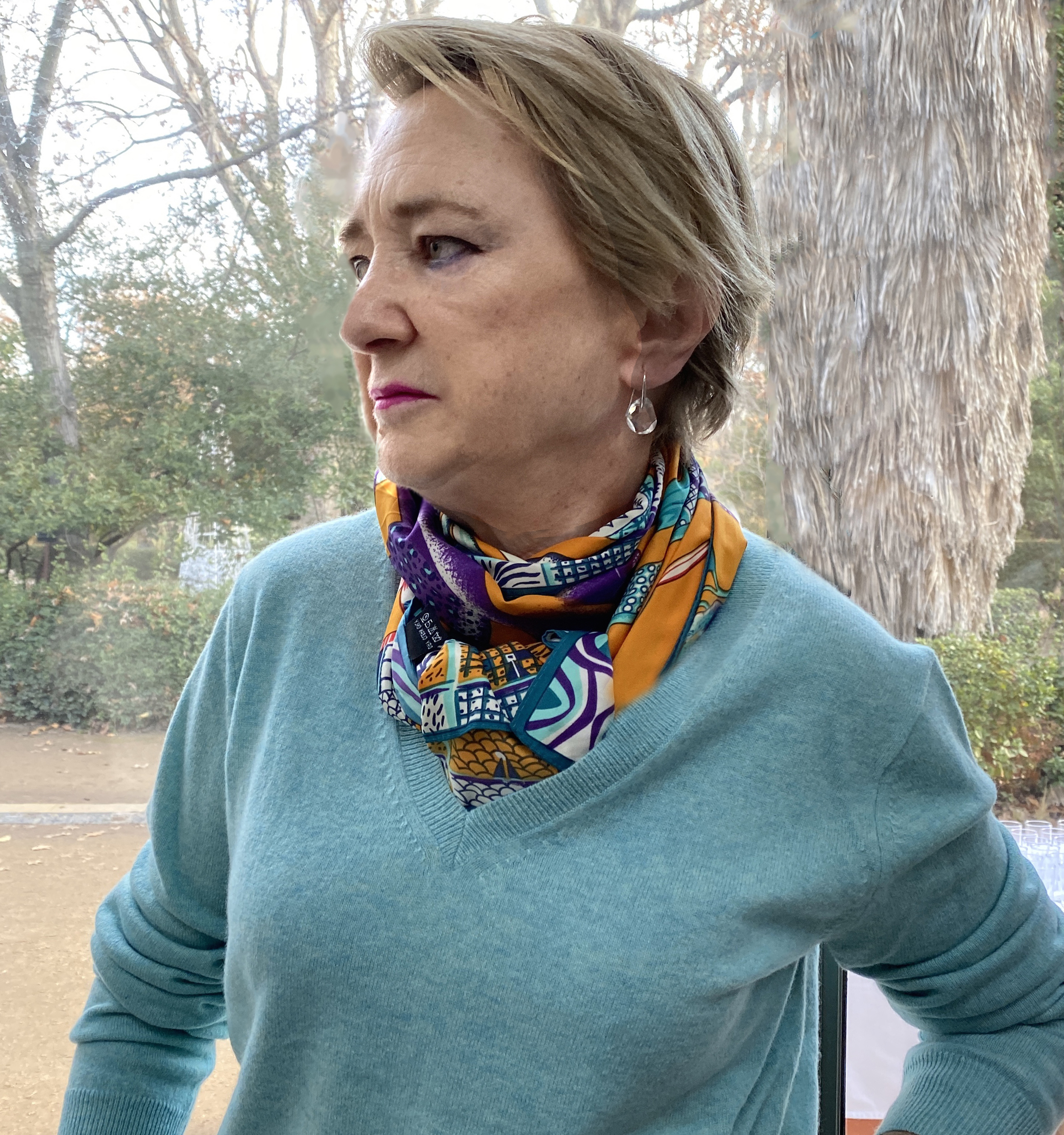 En exposición en el Jardín Botánico de Madrid